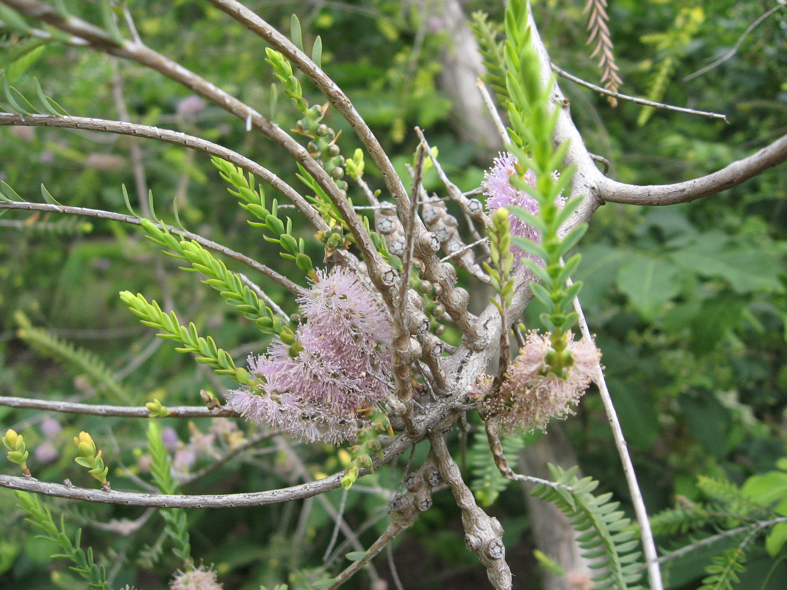 Melaleuca decussata. Real Jardín Botánico de Madrid.